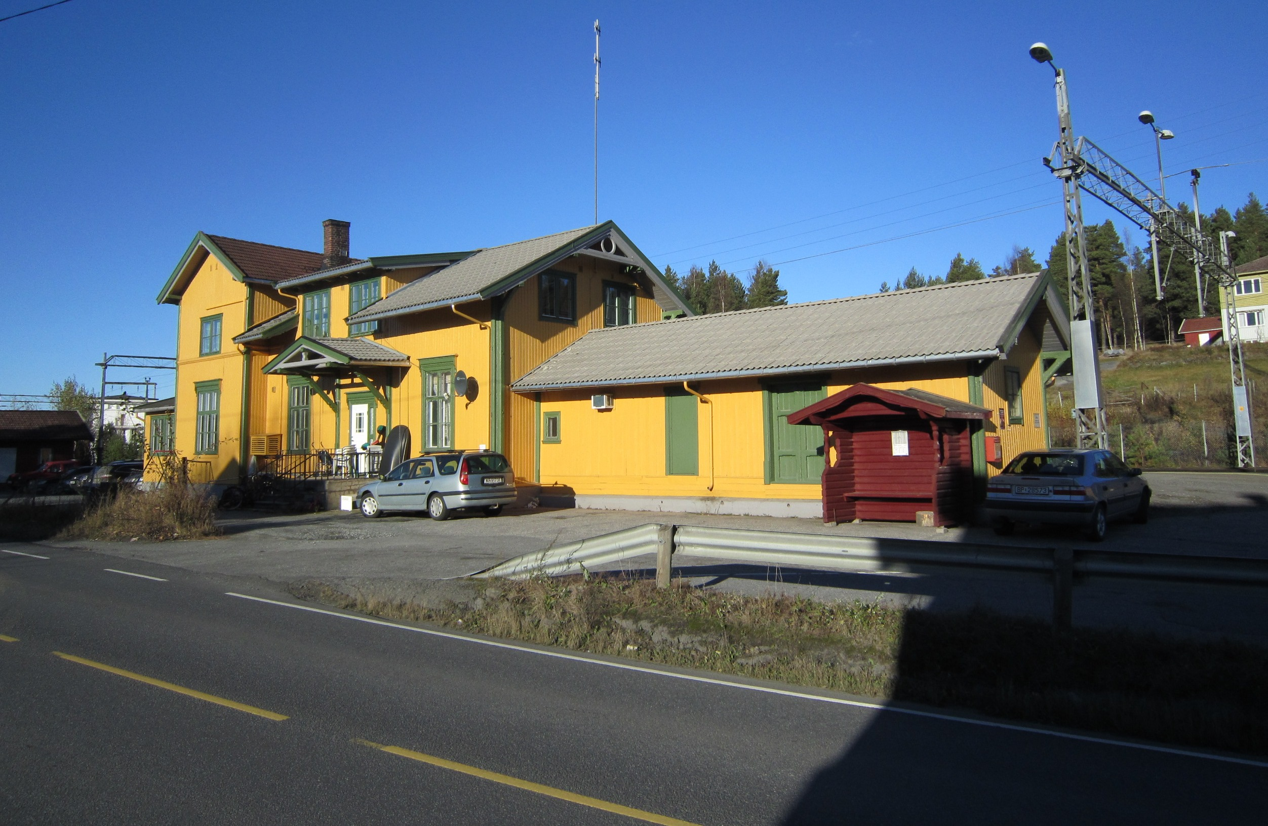 Fylkesvei 40 forbi Skollenborg stasjon